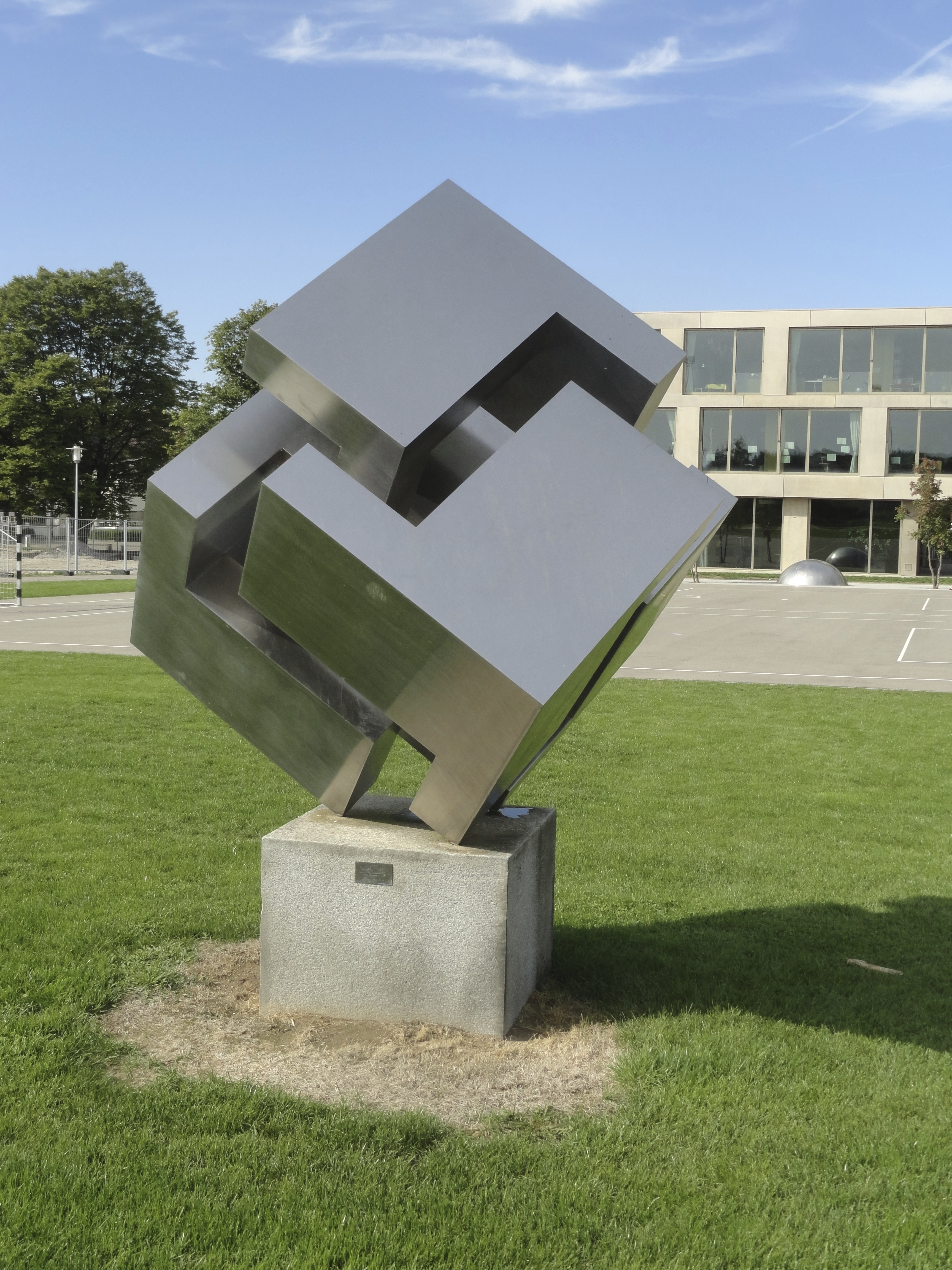 Carlo Vivarelli: "Vier konkave und vier konvexe Raumecken", Chromnickelstahl, 250 cm, Schulanlage Oescher, Zollikon CH. Seit Sommer 1972.